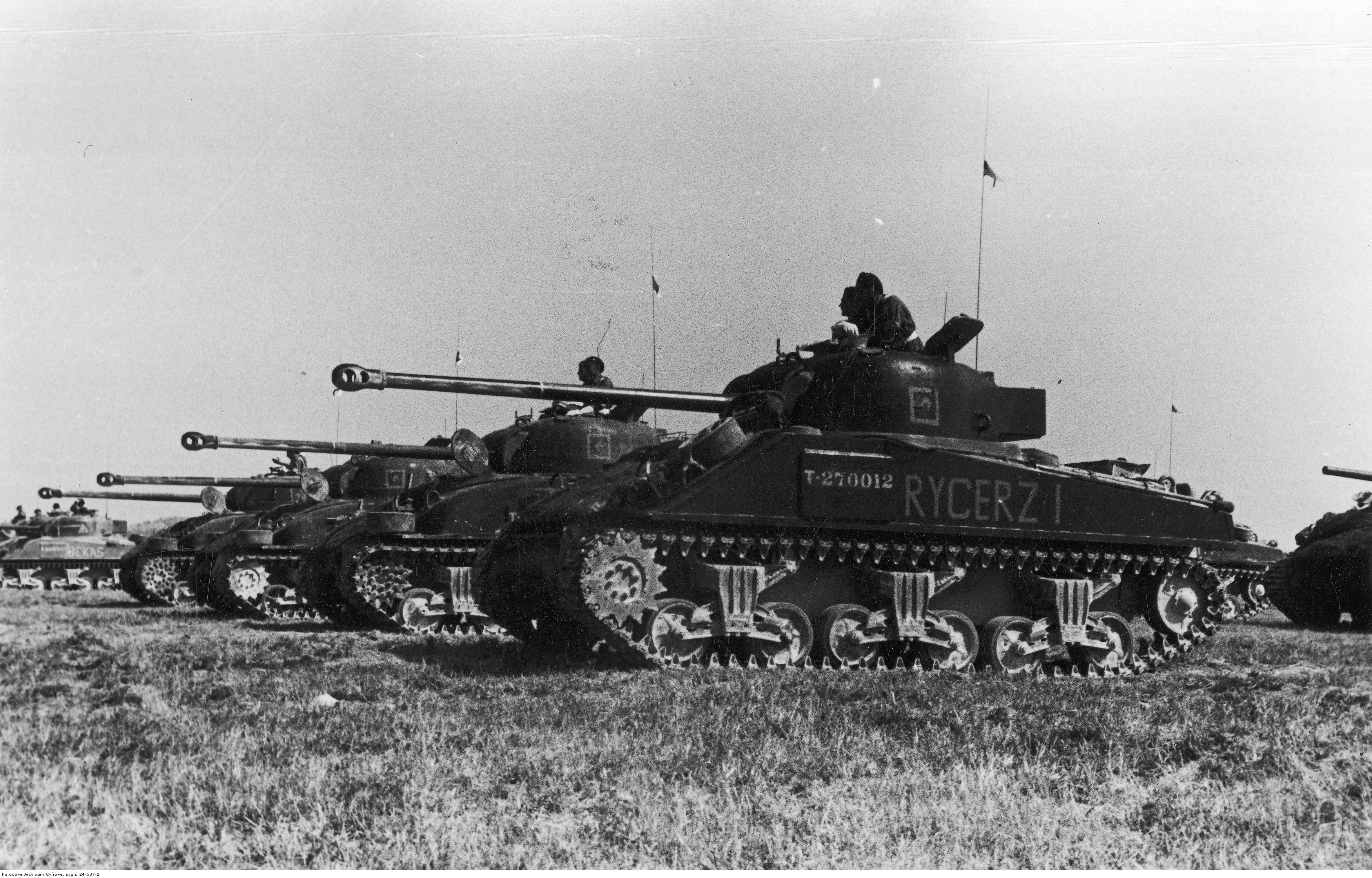 2 Warszawska Dywizja Pancerna w defiladzie pod Loreto. Czołgi Sherman Firefly z 1 Pułku Ułanów Krechowieckich. Na pierwszym planie czołg "Rycerz I". Archiwum Fotograficzne Tadeusza Szumańskiego. Sygnatura: 24-537-2